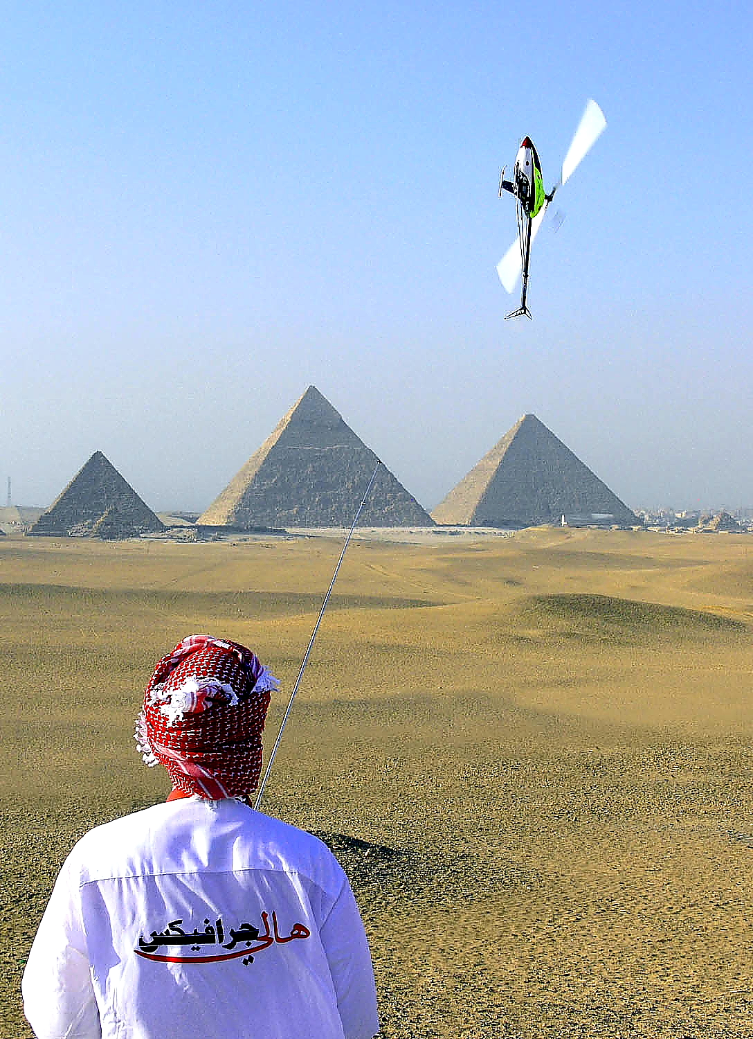 World Scenic Flights in Egypt- World Scenic Flights Kulisse Gizeh Pyramiden